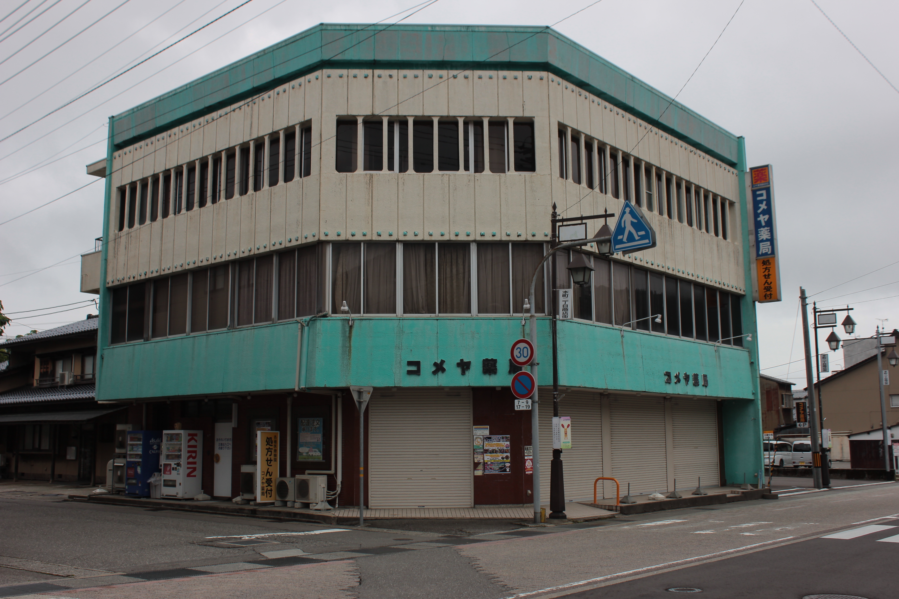 コメヤ薬局本店（石川県白山市） Canon EOS Kiss X5